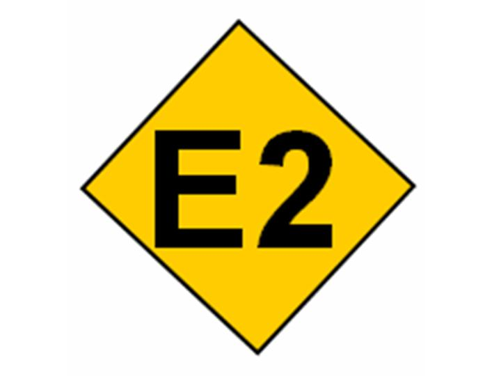 Systembytestavla